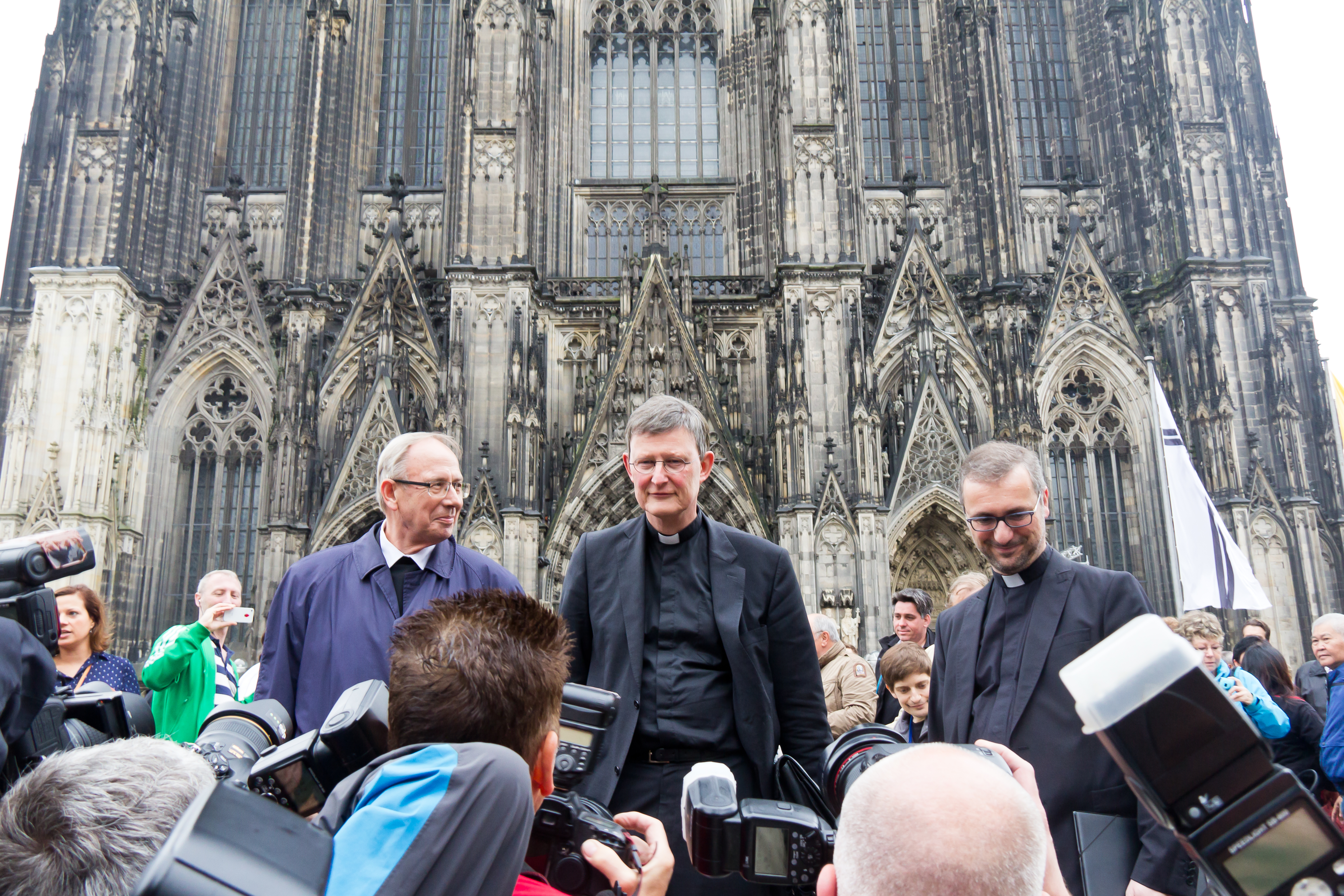 Kardinal Woelki - Weg von der Pressekonferenz zum Mittagsgebet im Kölner Dom Foto: Dompropst Norbert Feldhoff, Kardinal Woelki und Diözesanadministrator Stefan Heße vor dem Kölner Dom, zu dem sie nach der Pressekonferenz im Diözesanmuseum Kolumba für das Mittagsgebet zu Fuß rübergegangen sind